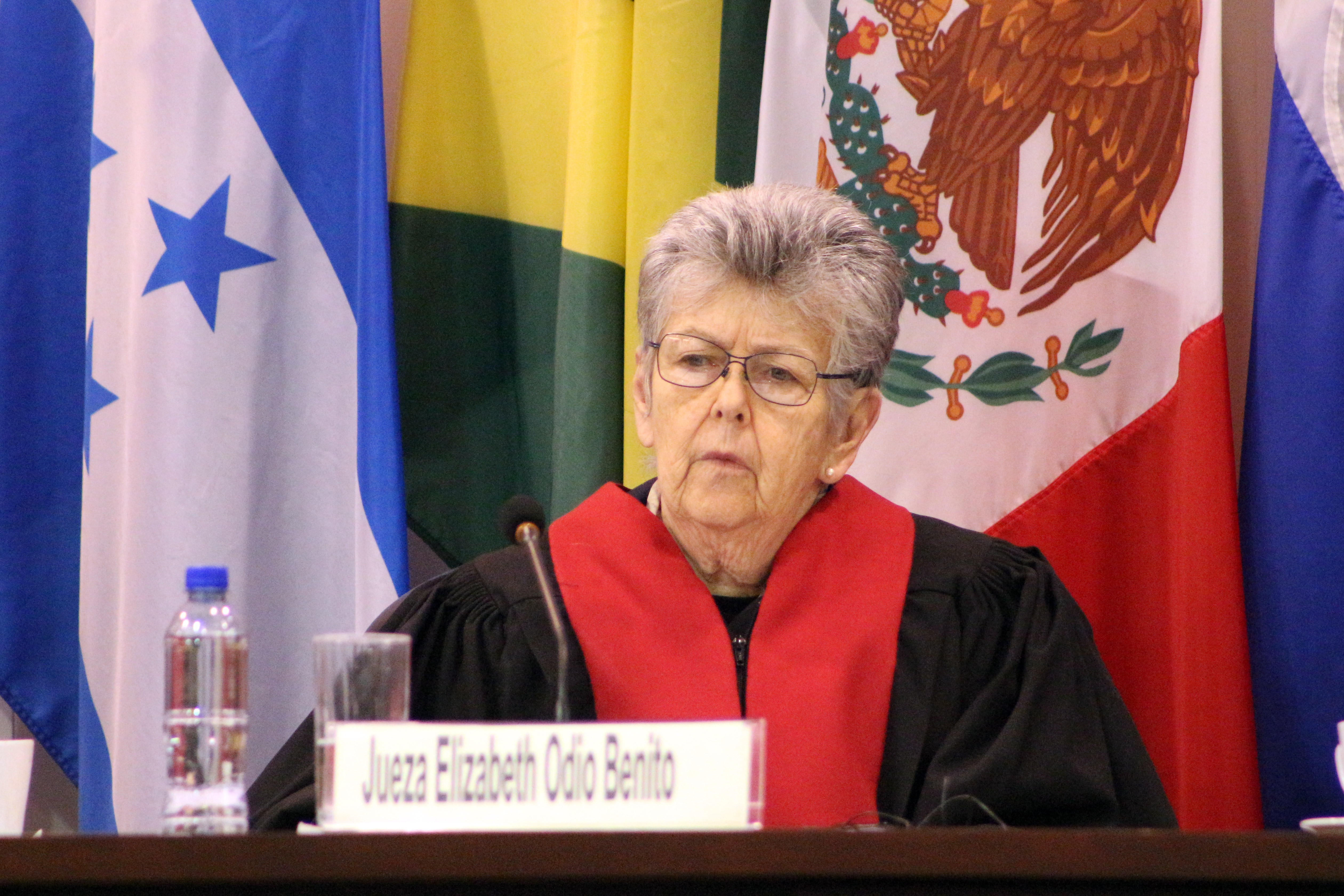 Jueza de la Corte IDH, Elizabeth Odio Benito